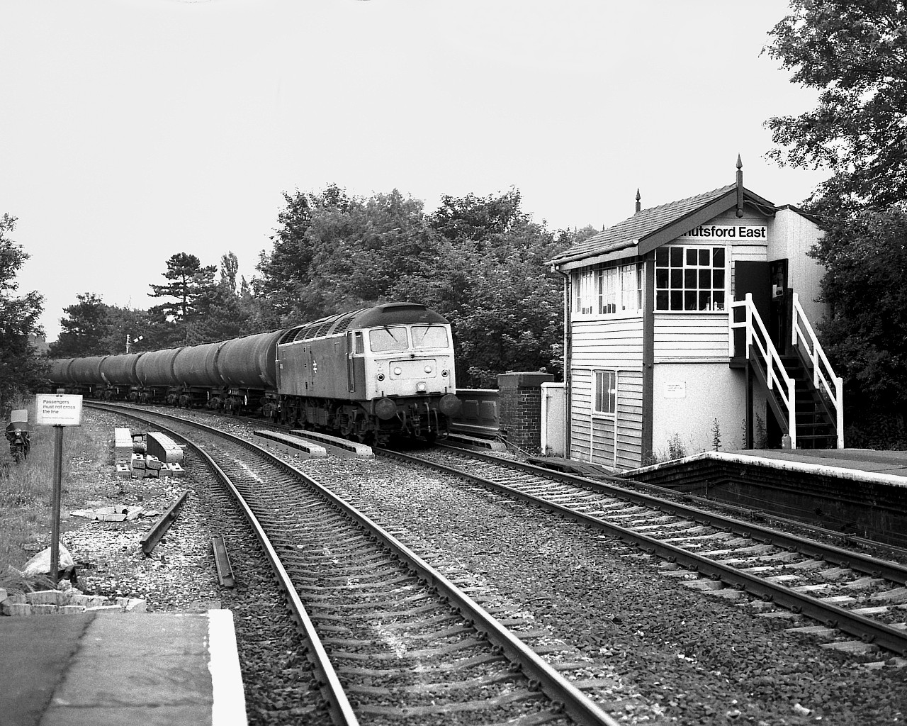 Knutsford